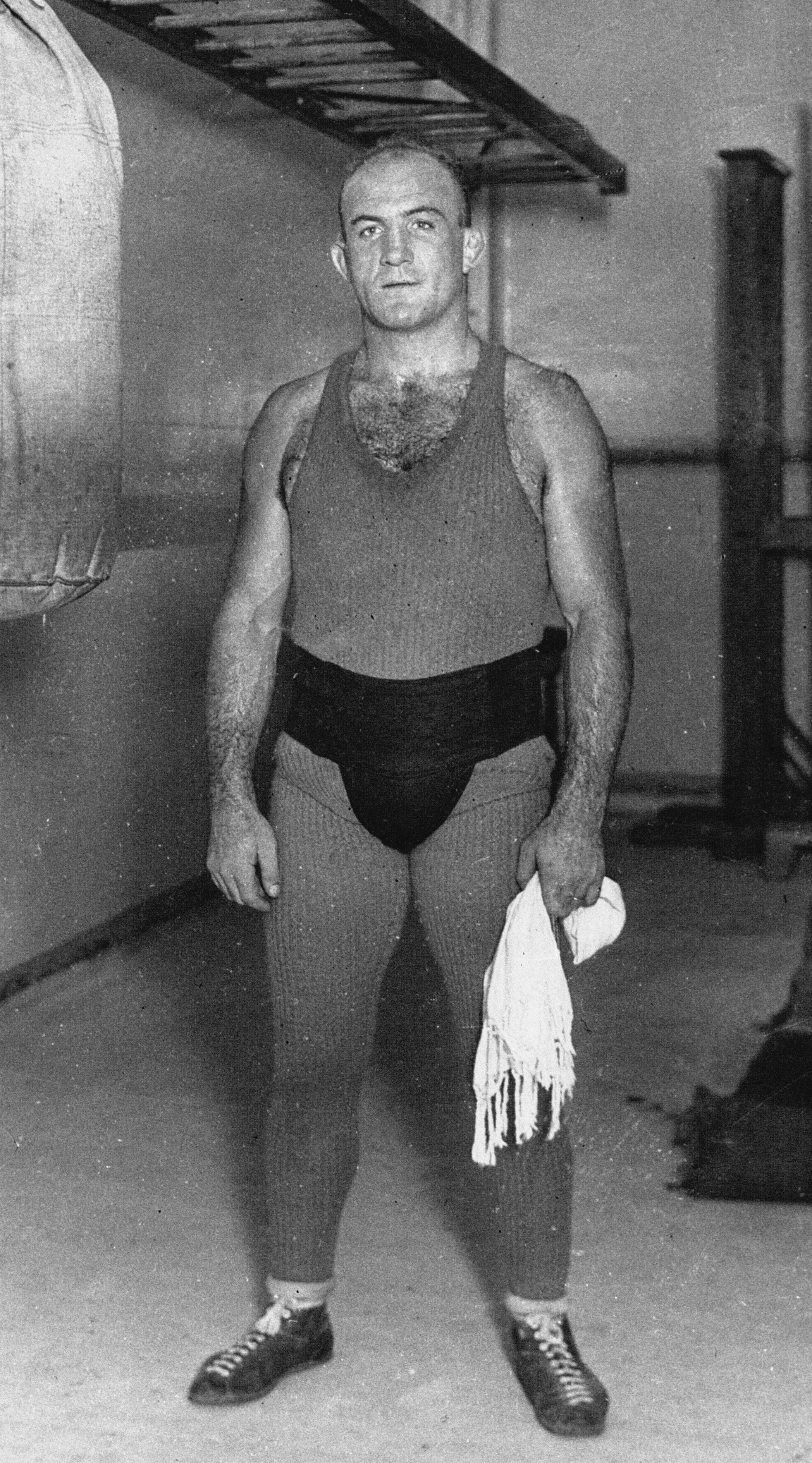 Suvigny, champion olympique à son travail.